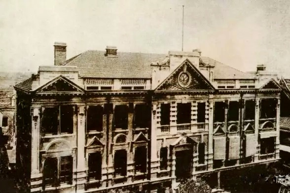 中文（香港）: 上海总商会议事厅大楼俯视外观（1920年）